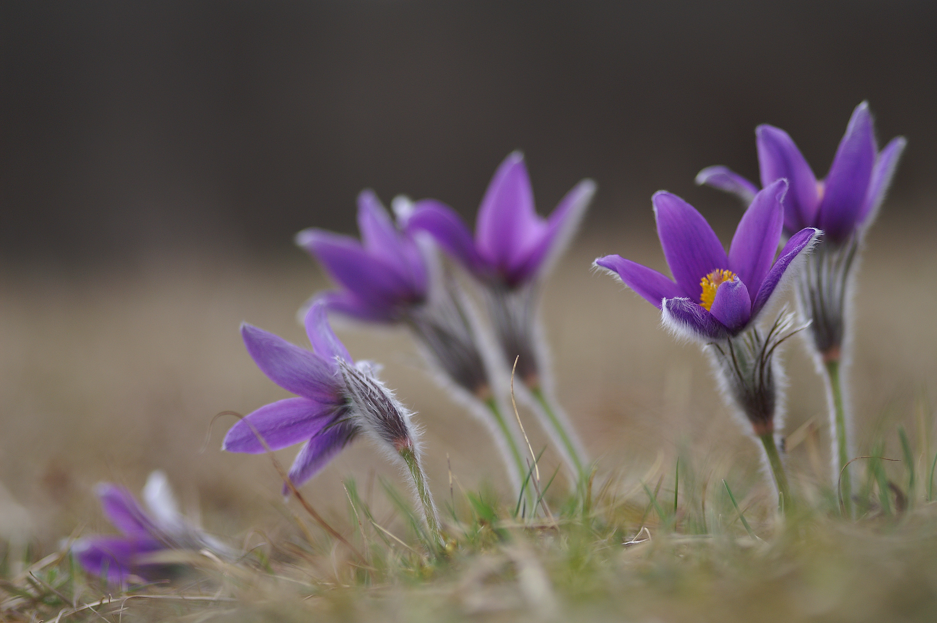 Küchenschelle/Kissiner Heide